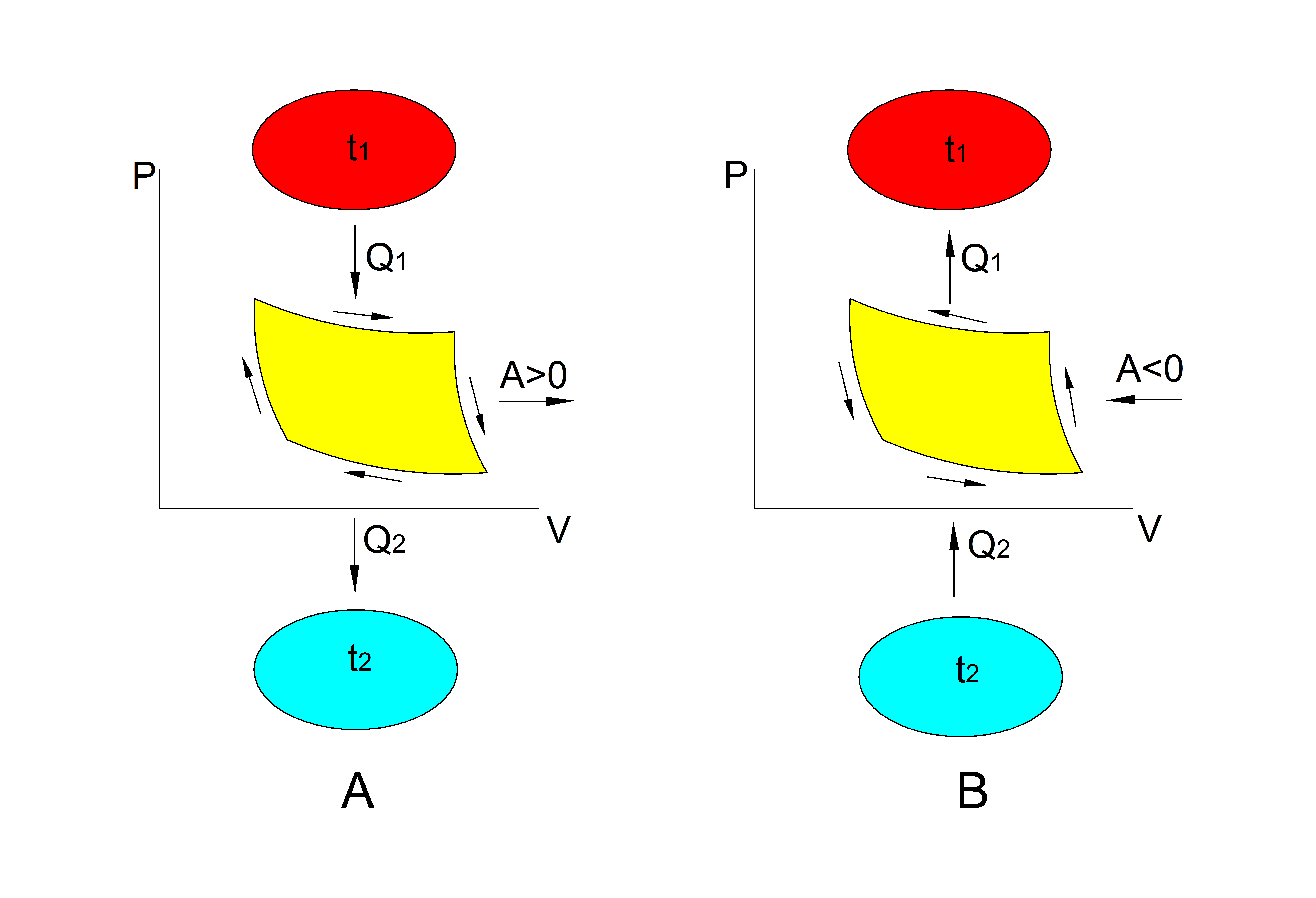 Данная диаграмма поясняет принцип работы тепловых машин: тепловых двигателей, холодильных машин и тепловых насосов, в которых периодически осуществляются круговые процессы (циклы).